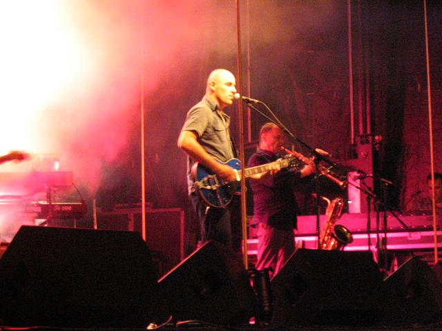 Dominique A en concert place Saint-Marc, à Rouen, le 27 juillet 2006, dans le cadre de l'opération « terrasses du jeudi ». Photographie personnelle.